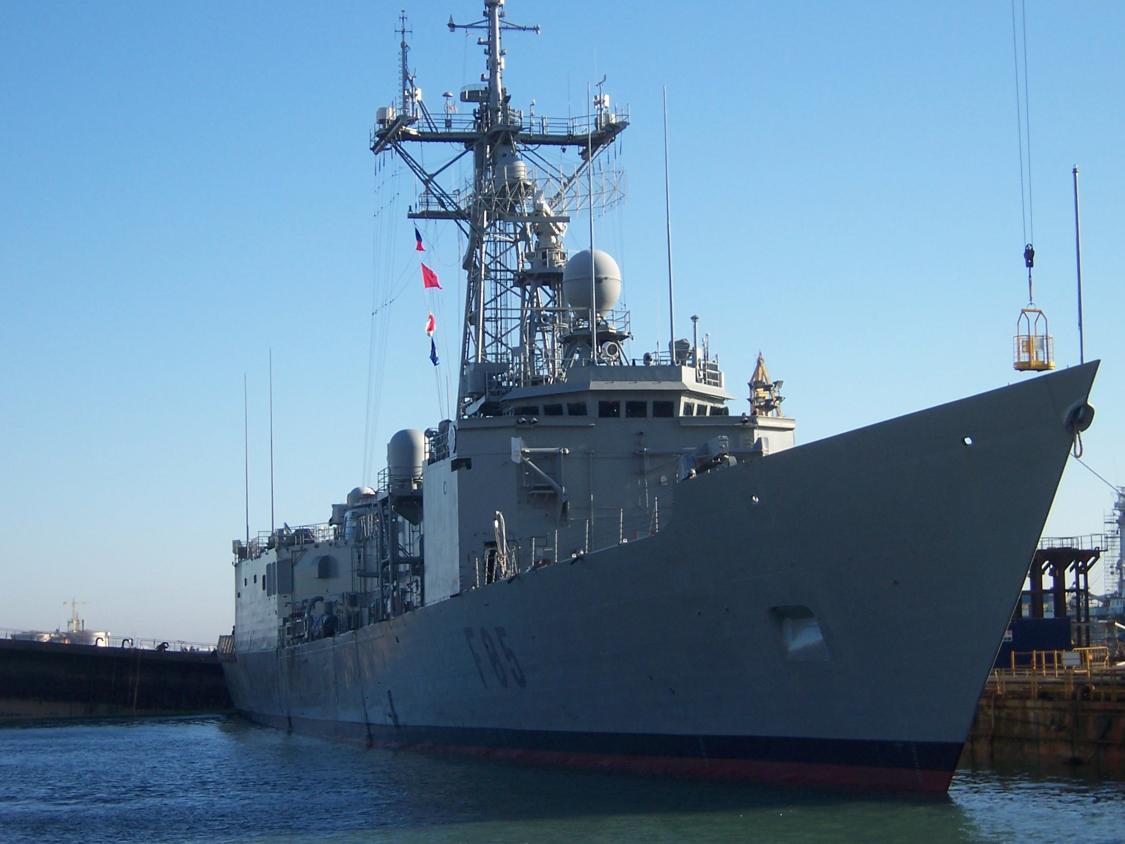 La fragata Navarra (F85) de la Armada española en Rota, Cádiz.